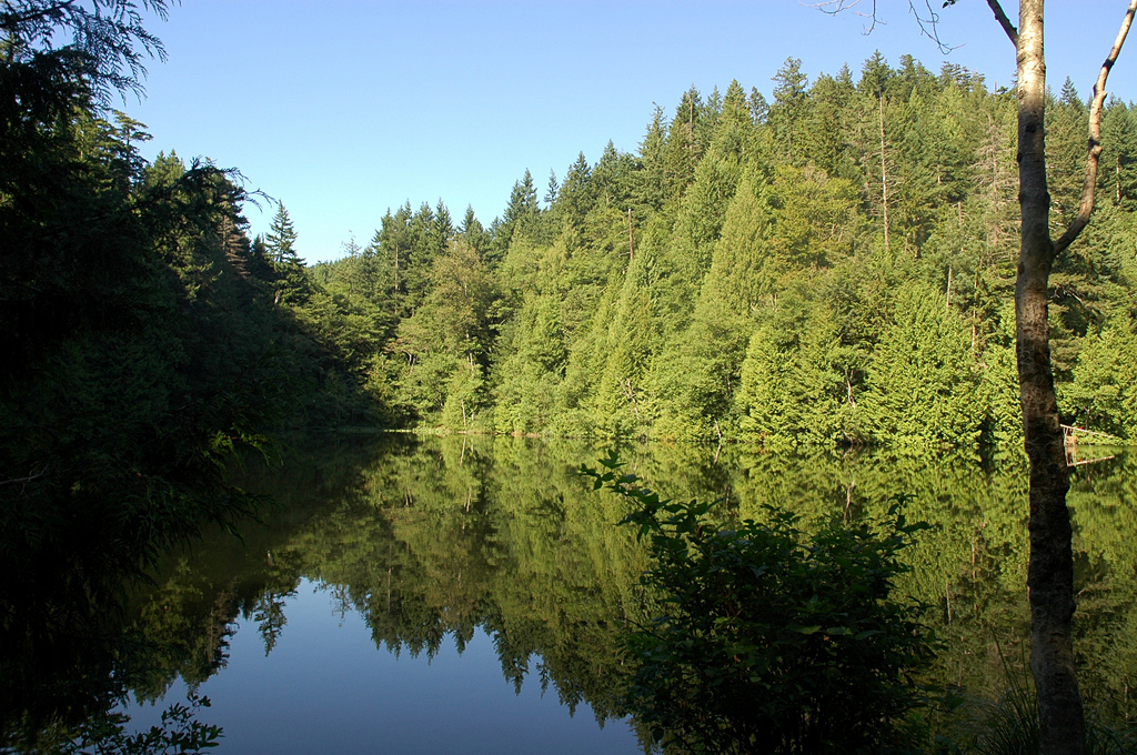 Fragrance Lake